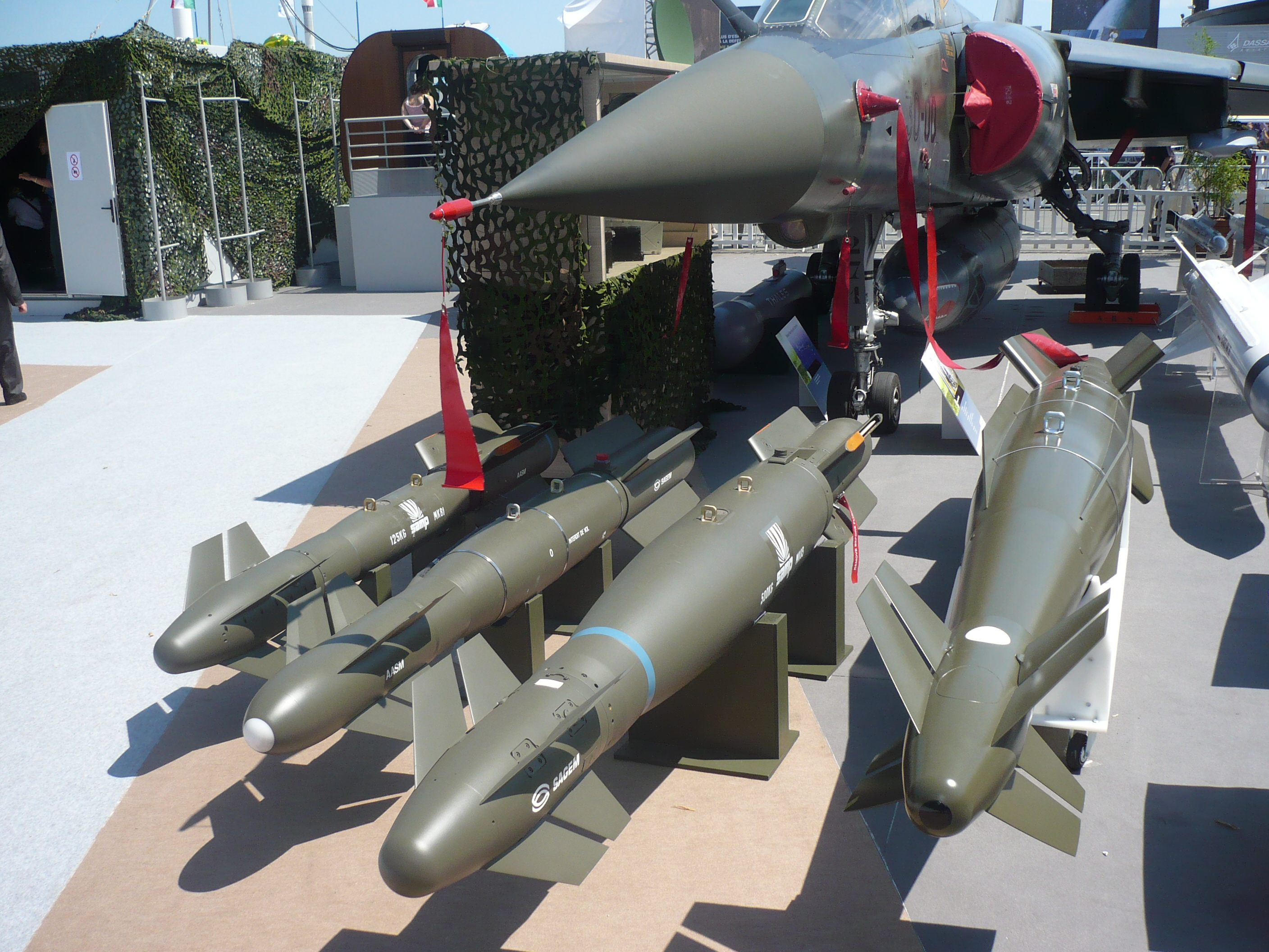 Bombes guidée a coté d'un mirage F1 (de gauche a droite), kit 125kg et 250kg, 500kg, et 1000kg.